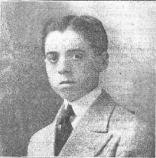 Fotografía del pintor español Rafael Argelés publicada en 1914 con motivo de haber conseguido por oposición una plaza de pensionado de Pintura en la Academia Española de Roma